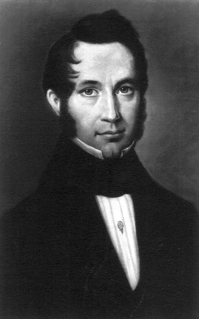 S/W-Photographie (oder Gemälde?) von Carl Bechem (1806–1891)